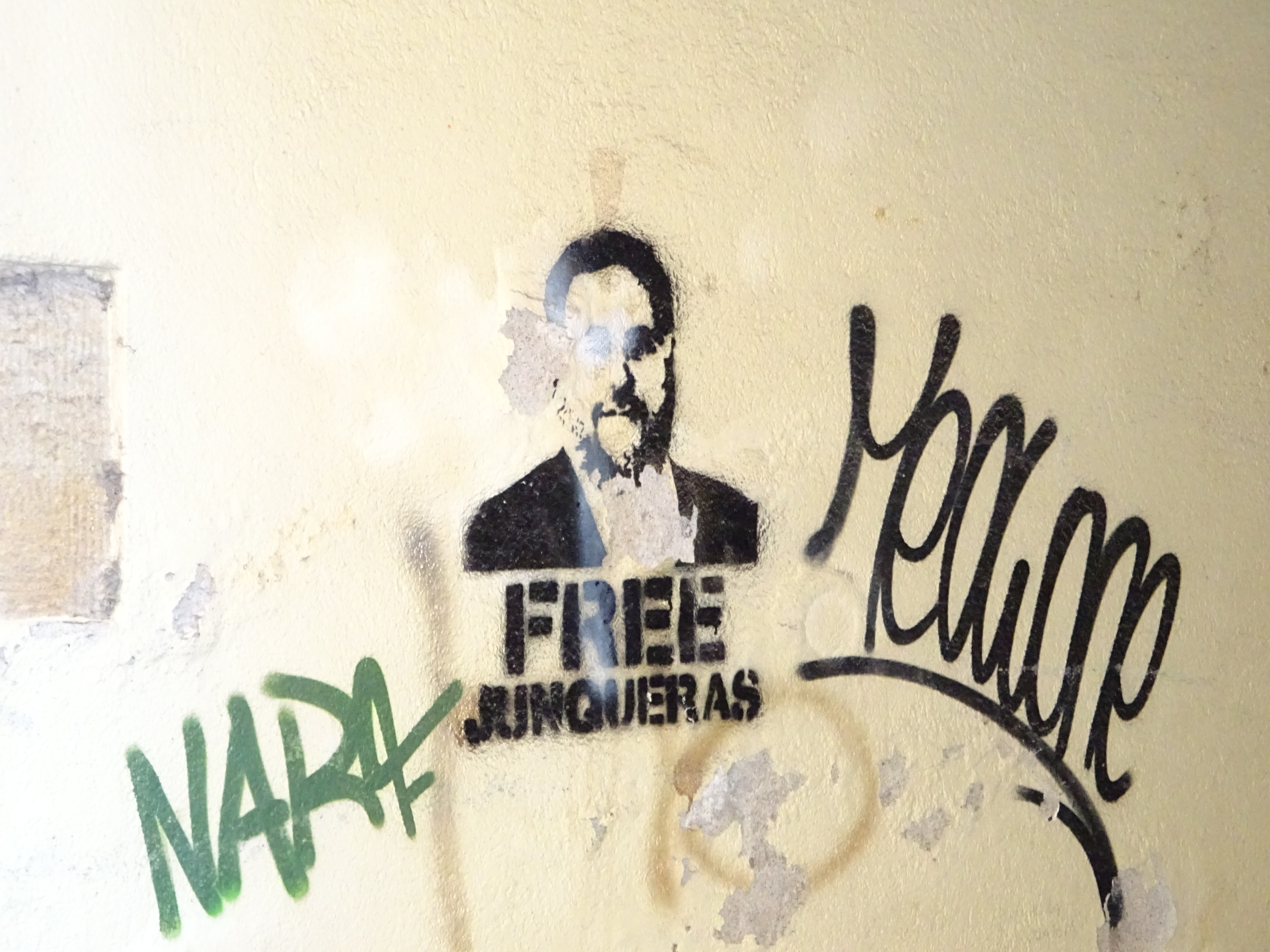 Pochoir réclamant la liberté d'Oriol Junqueras - La Bisbal d'Empordà